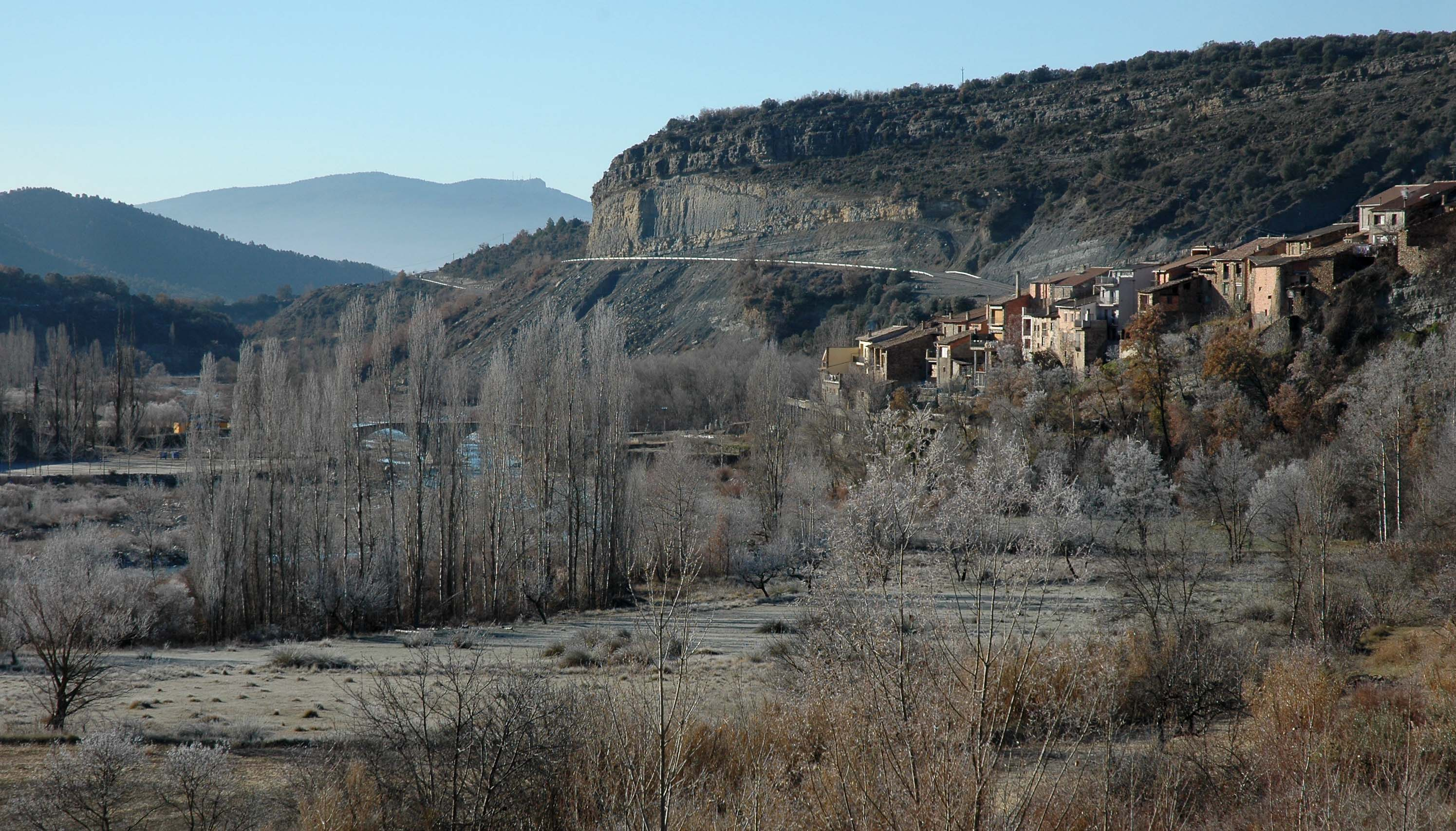 Foto feta des de la carretera Graus-Pont de Suert. A la dreta podem veure la població de la Pobla de Roda, cap del municipi d'Isàvena, a la Ribagorça Aragonesa.